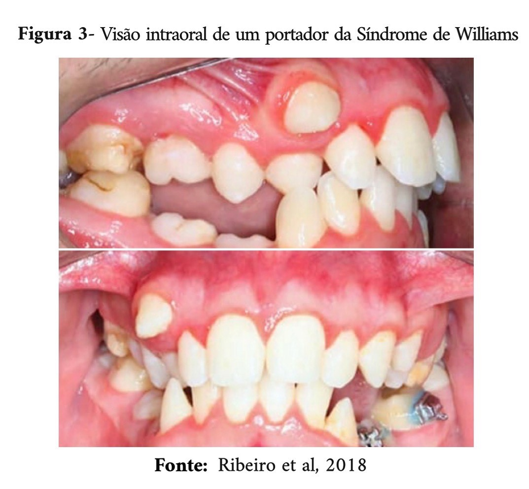 Dentes de uma criança com a SWB